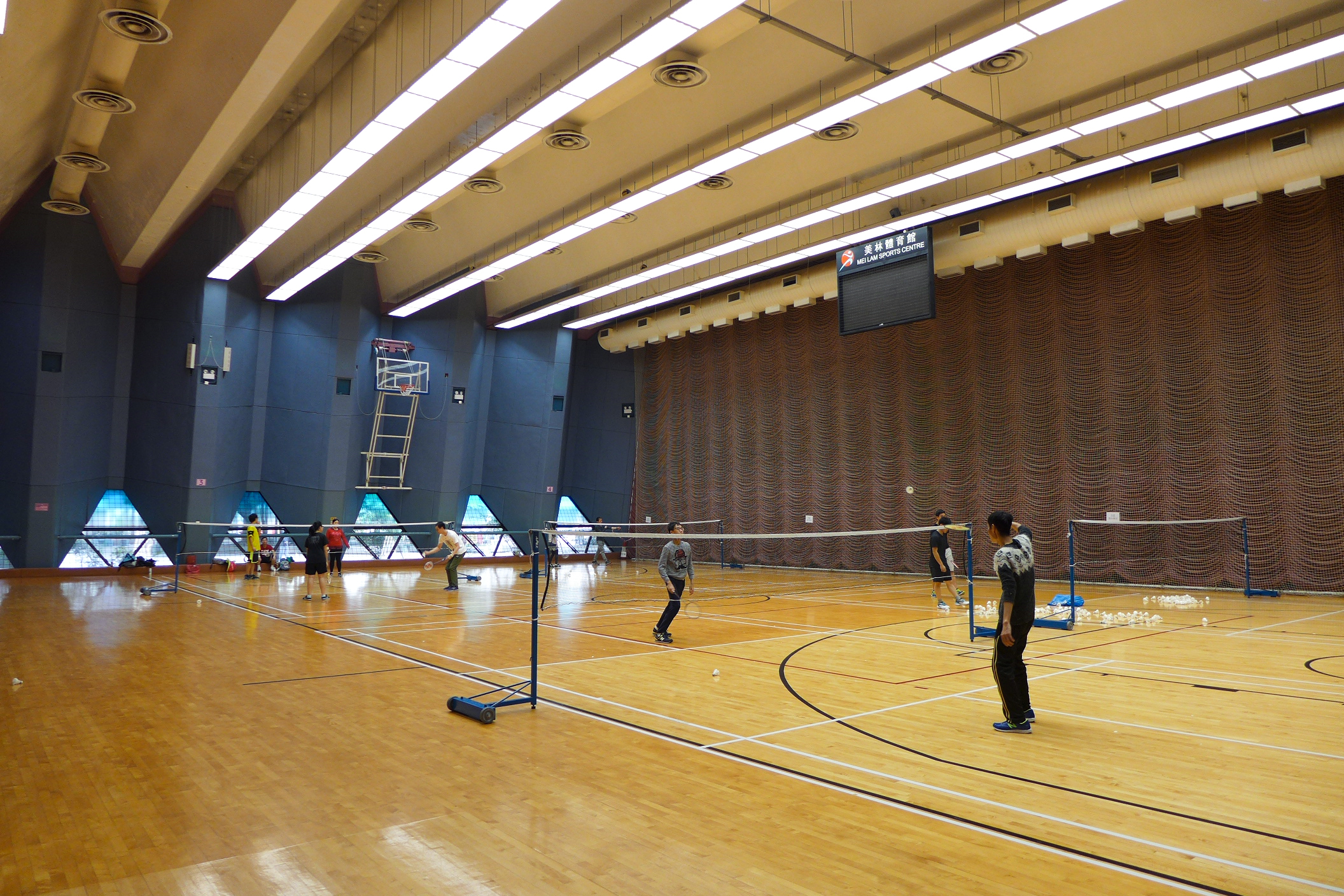 Mei Lam Stadium Multi Purpose Arena